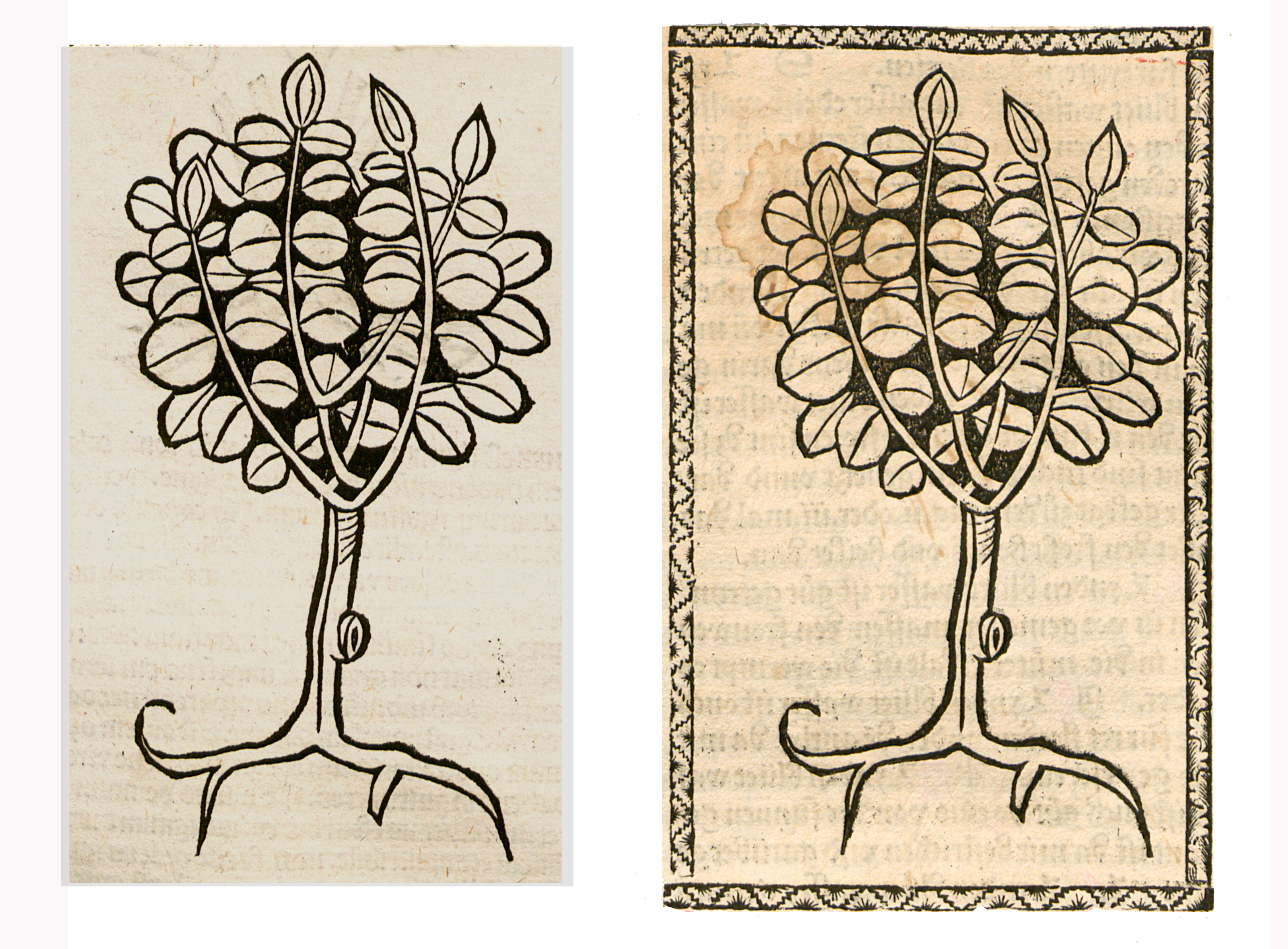 Abbildung von: Linden Blüet (Tilia)